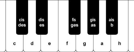 Schematische Darstellung der Klaviatur von Tasteninstrumenten